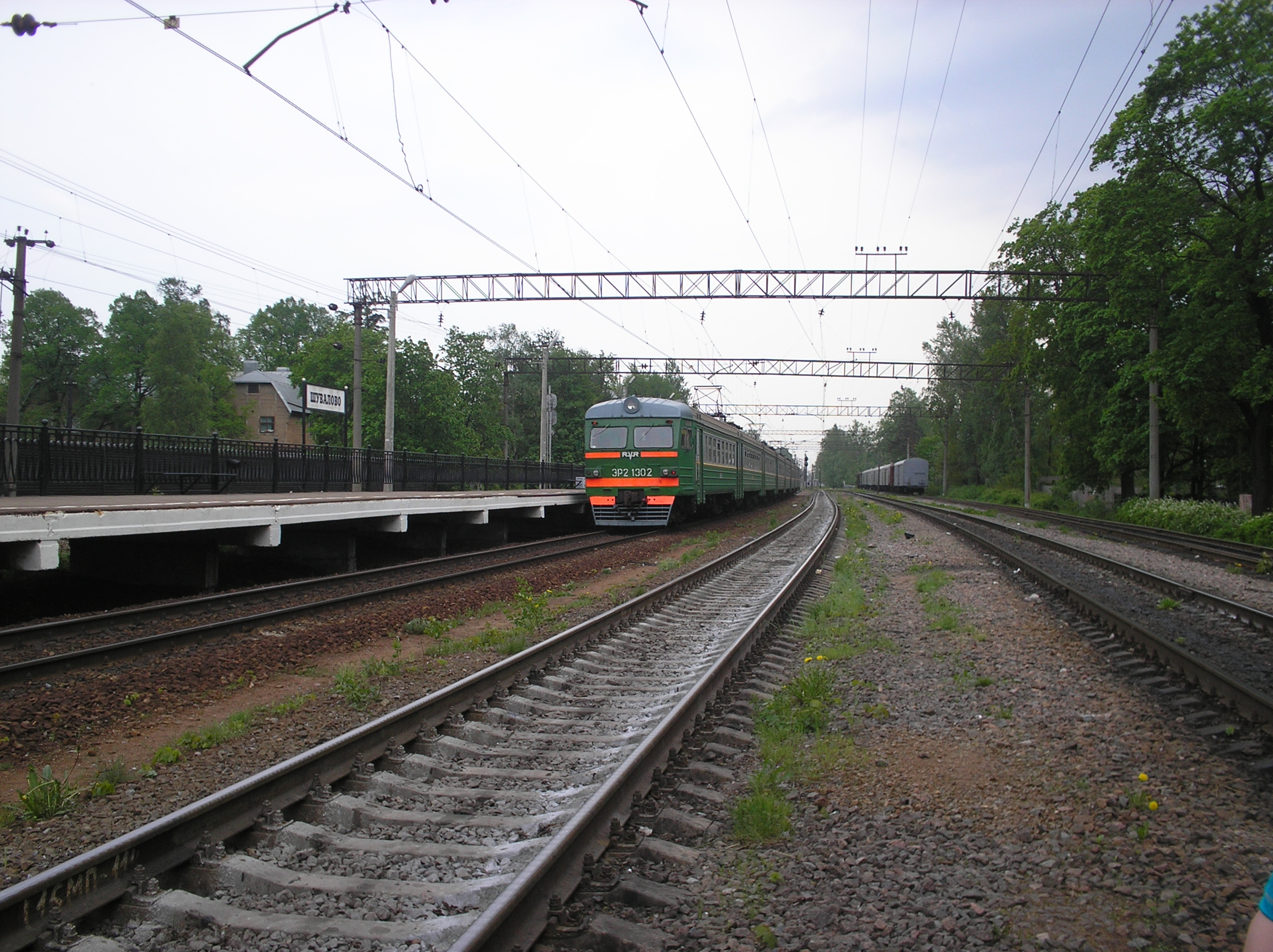 Станция Шувалово